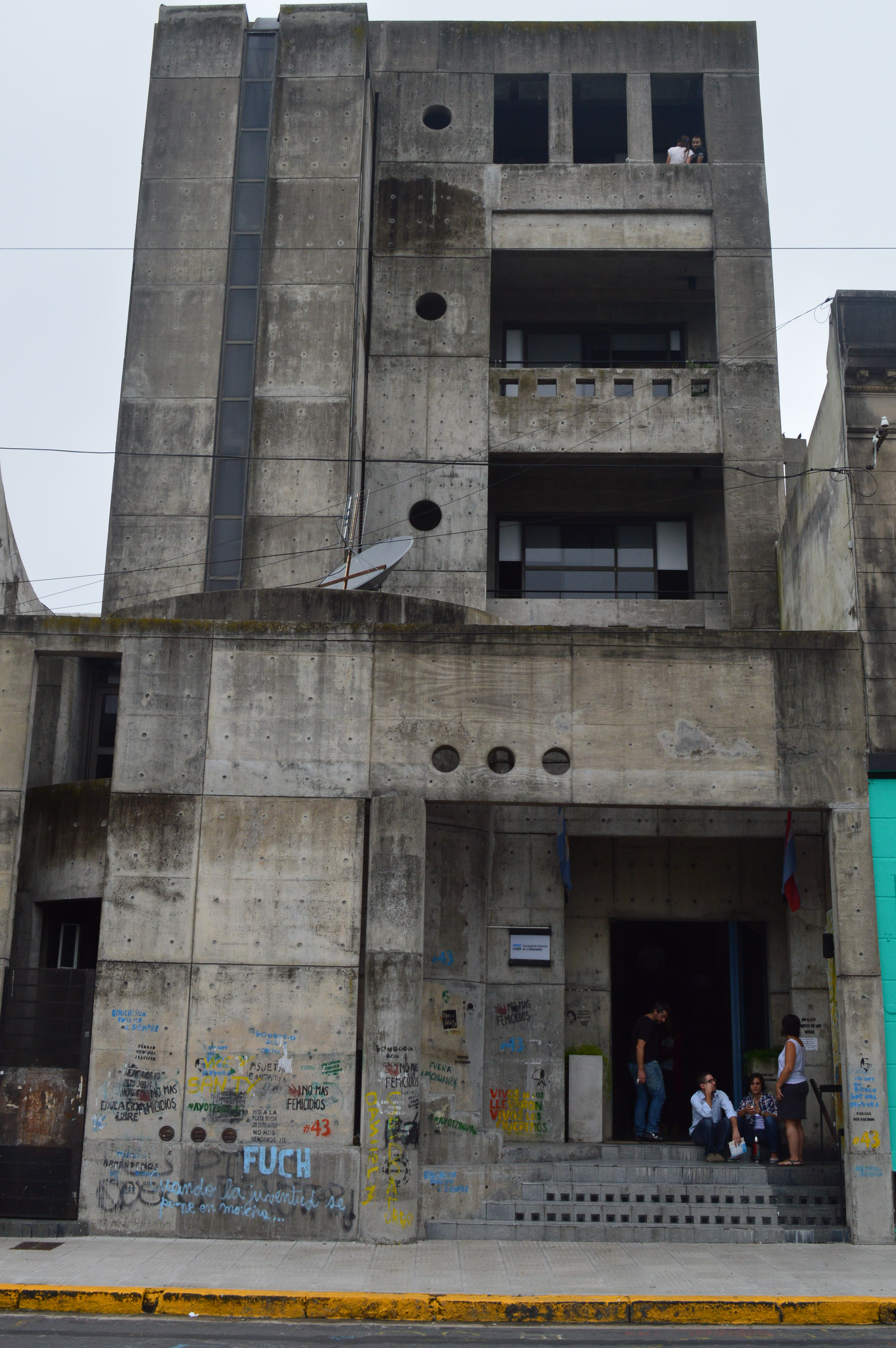 Fachada edificio principal de cursado de la Facultad de Ciencias de la Educación - UNER